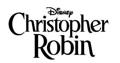 logo de christopher robin